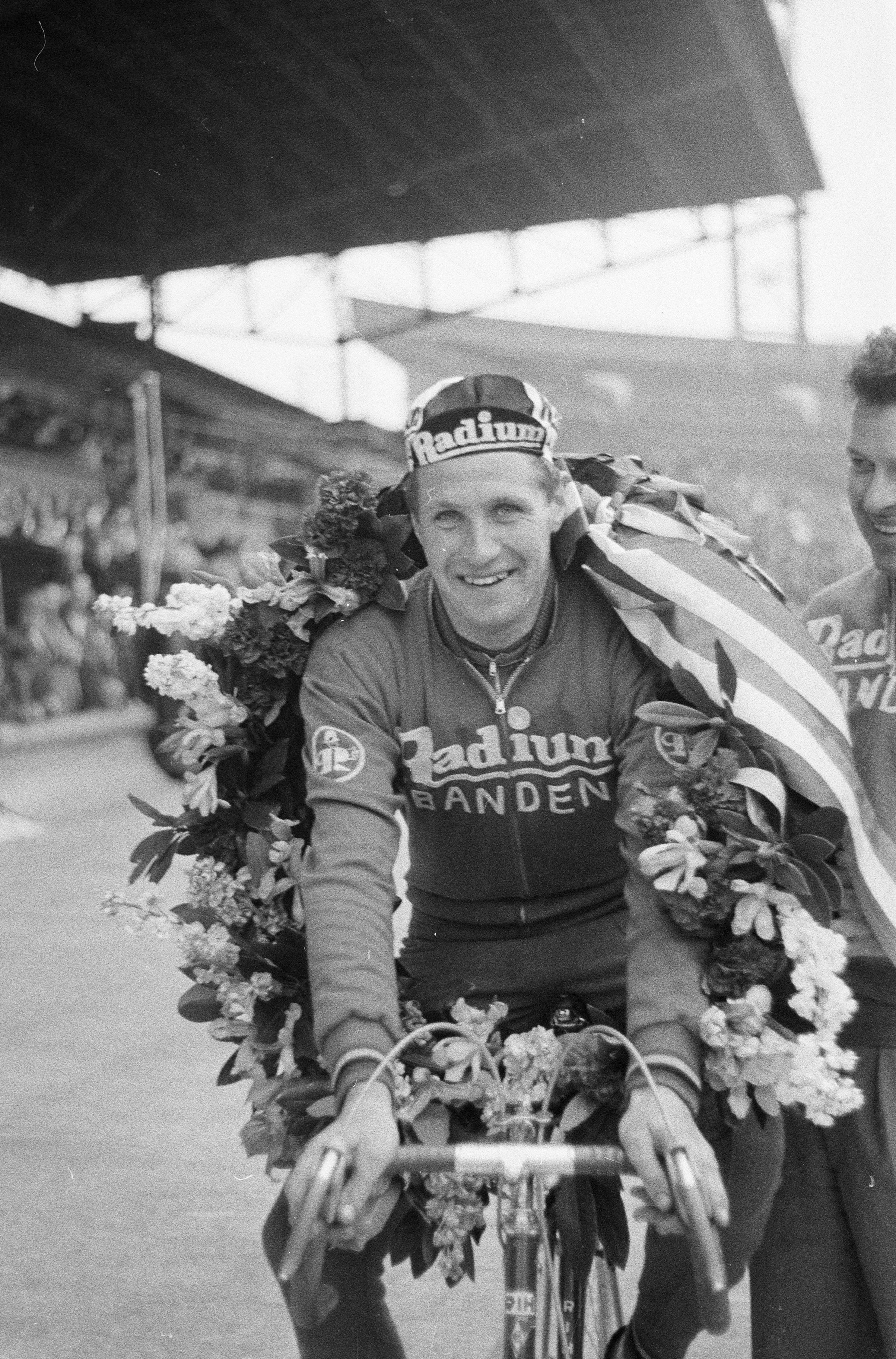 Collectie / Archief : Fotocollectie Anefo Reportage / Serie : [ onbekend ] Beschrijving : Einde Ronde van Nederland in het Olympisch Stadion te Amsterdam Datum : 17 mei 1960 Locatie : Amsterdam, Noord-Holland Trefwoorden : kransen, wielrenners Instellingsnaam : Olympisch Stadion Fotograaf : Pot, Harry / Anefo Auteursrechthebbende : Nationaal Archief Materiaalsoort : Negatief (zwart/wit) Nummer archiefinventaris : bekijk toegang 2.24.01.05 Bestanddeelnummer : 911-2629